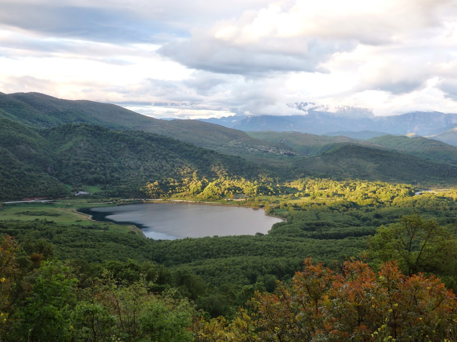 Άποψη της λίμνης Ζαραβίνας με το ομώνυμο χωριό στο βάθος